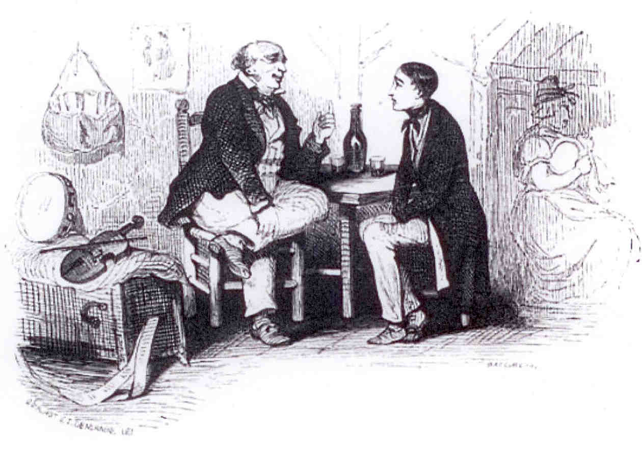 Illustration de la rencontre du jeune Marcellin dit Aubert futur célèbre chanteur des rues de Paris avec son bienfaiteur. Cette scène se passe peu après ou en 1789. Aubert a 20 ans.